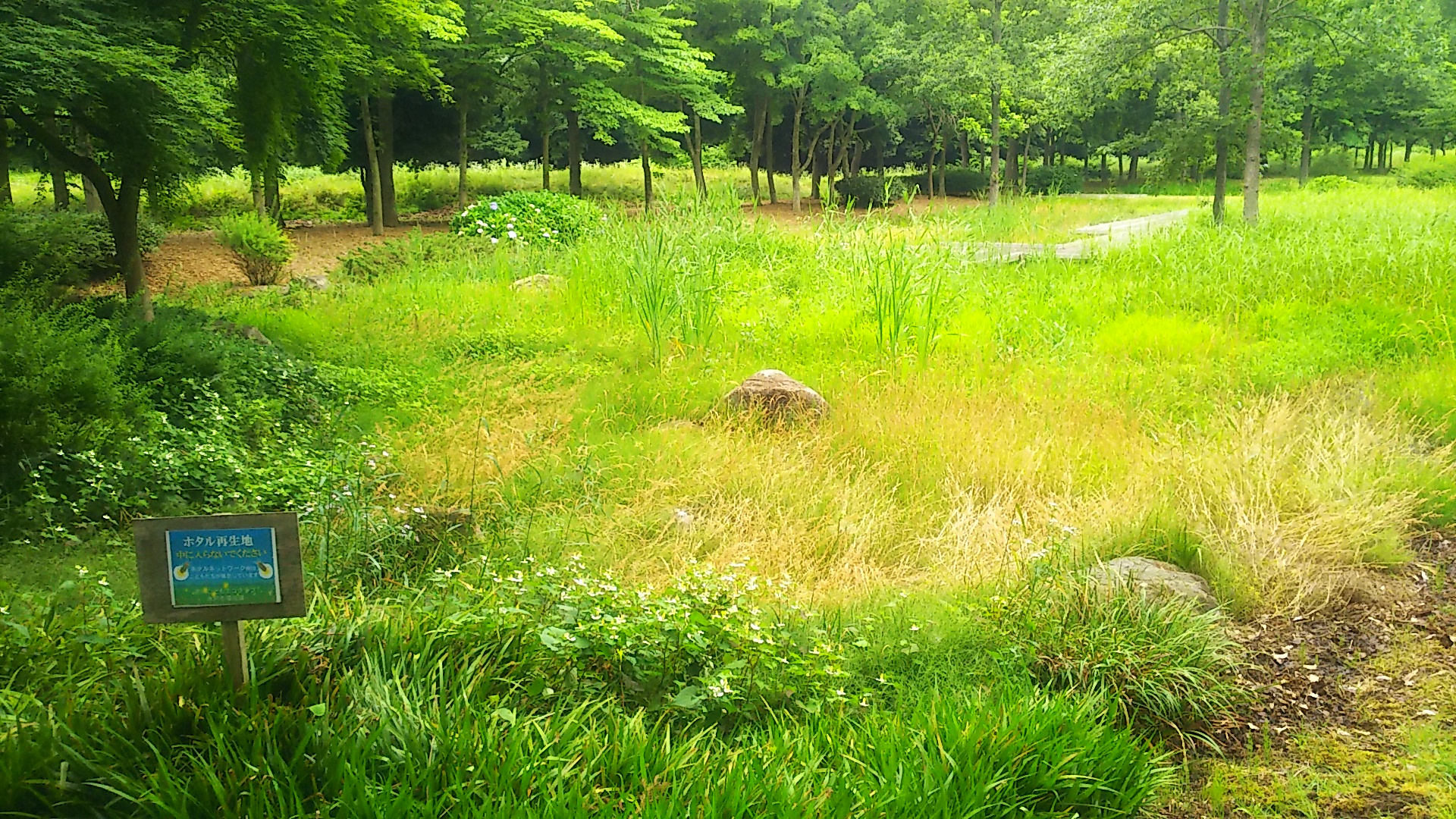 茨城県水戸市を流れる逆川、及び逆川緑地